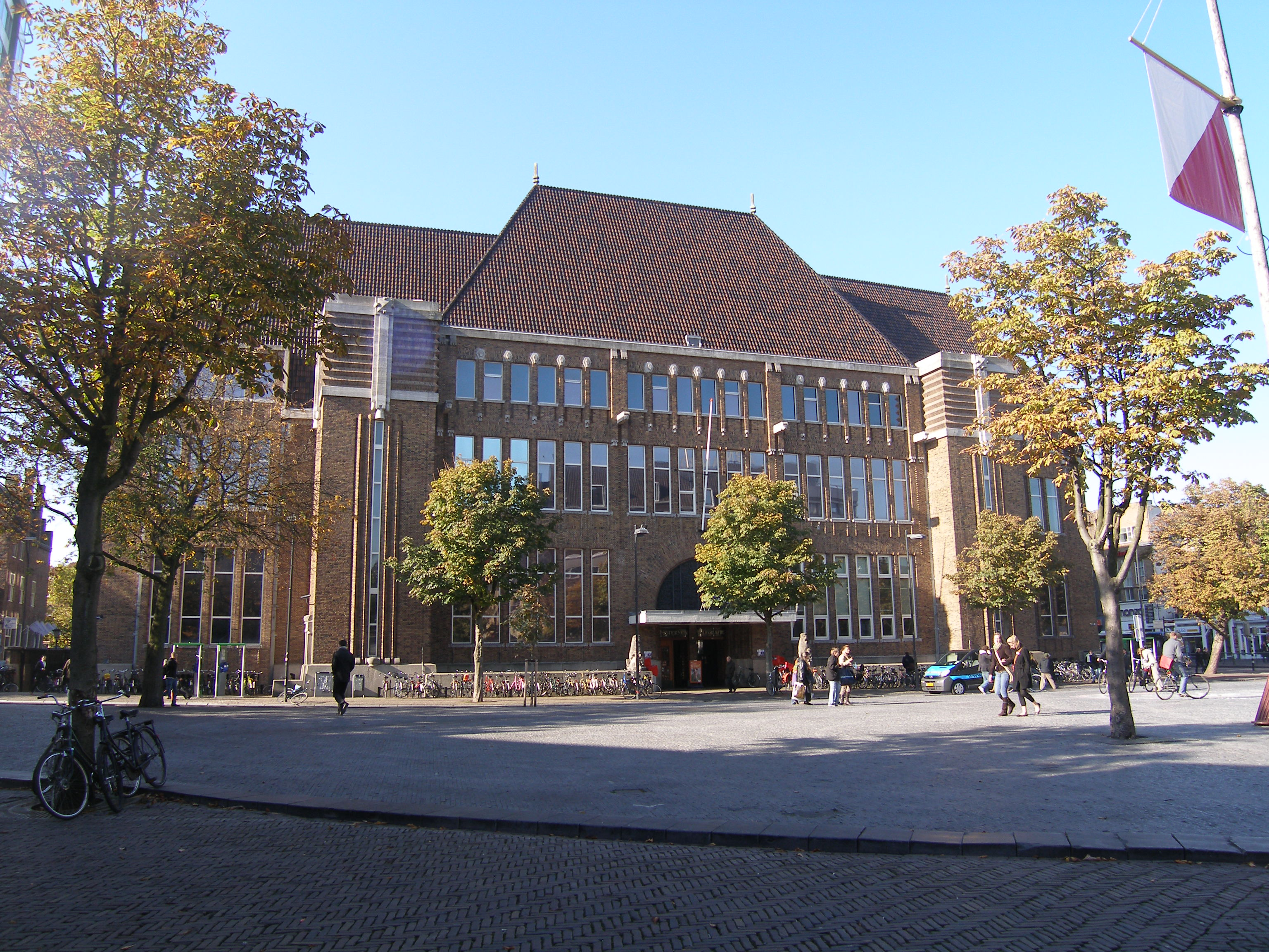 Vooraanzijde van het postkantoor aan de Neude